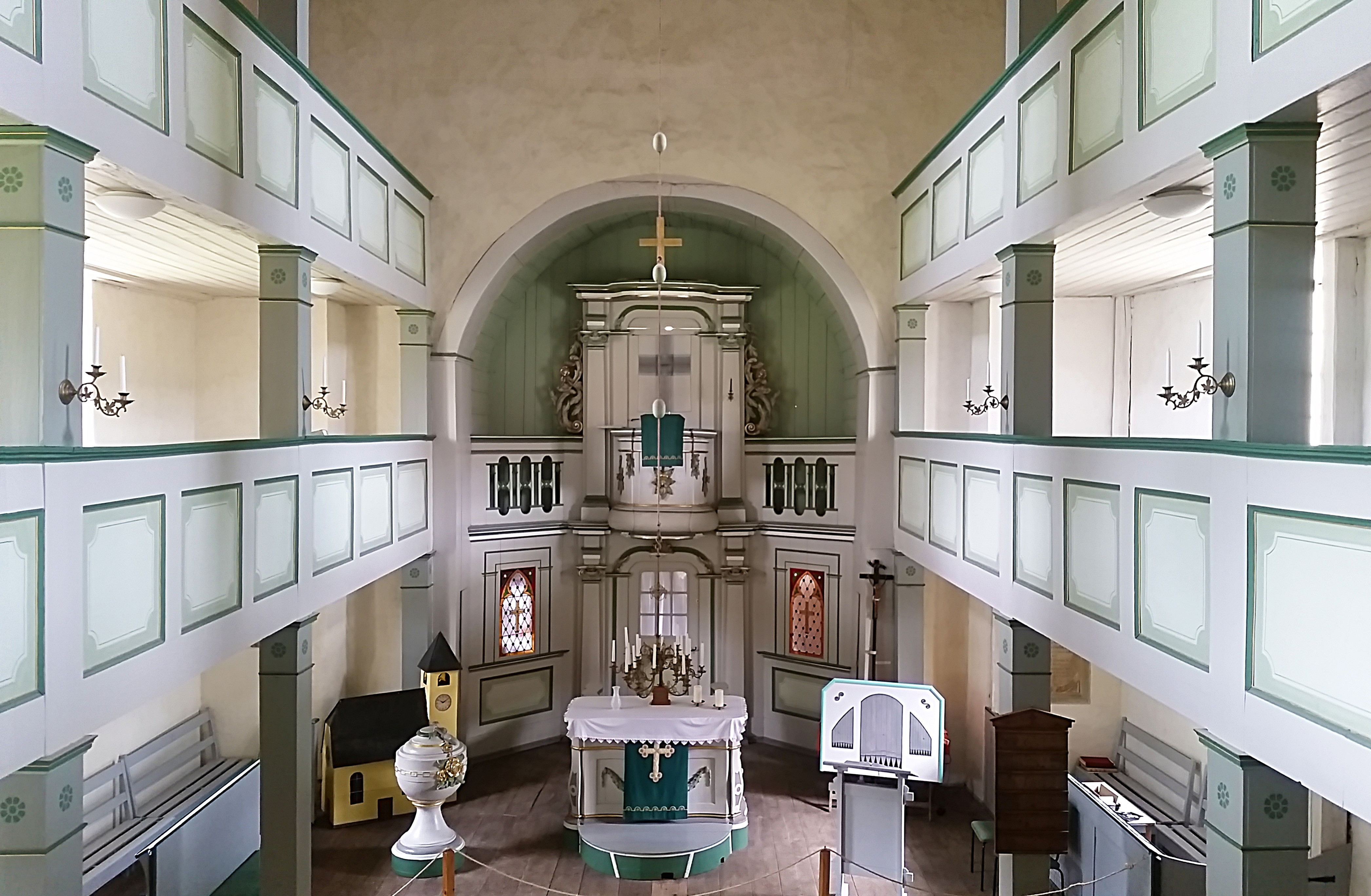 Innenraum der Dorfkirche St. Burkhard (Hohenfelden)